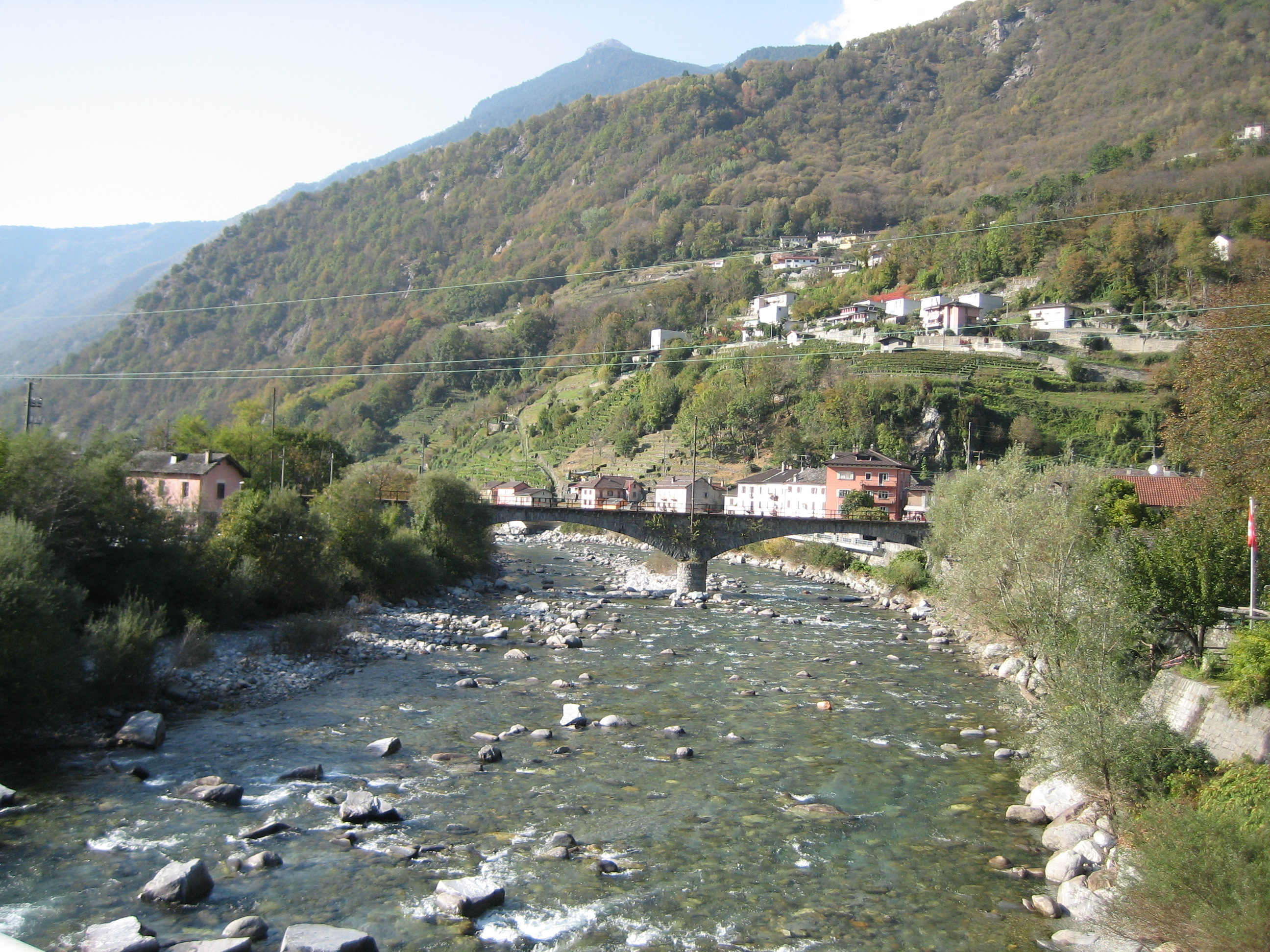 Moësa bei Roveredo GR